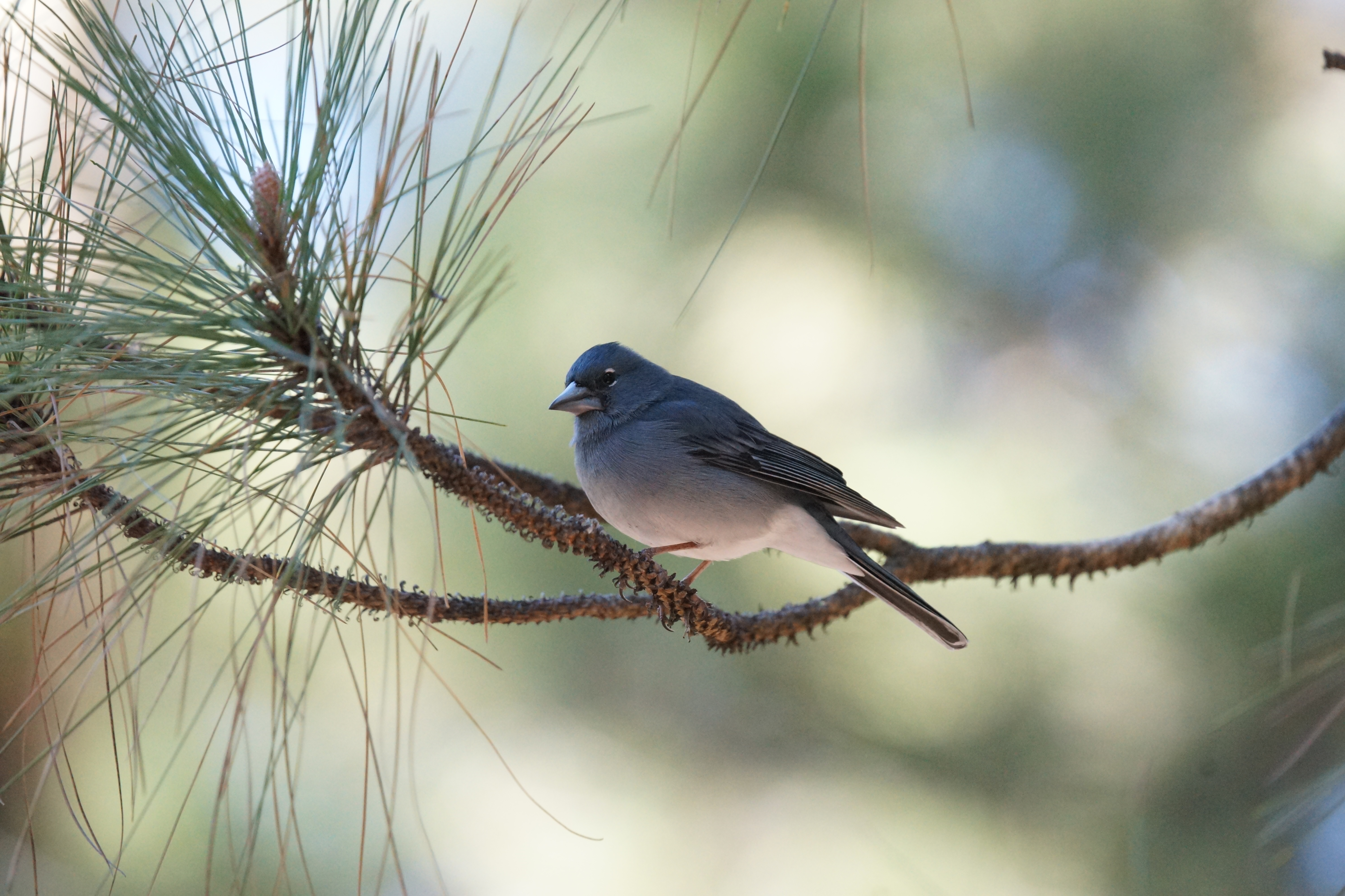 Teidefink (Fringilla teydea), Männchen